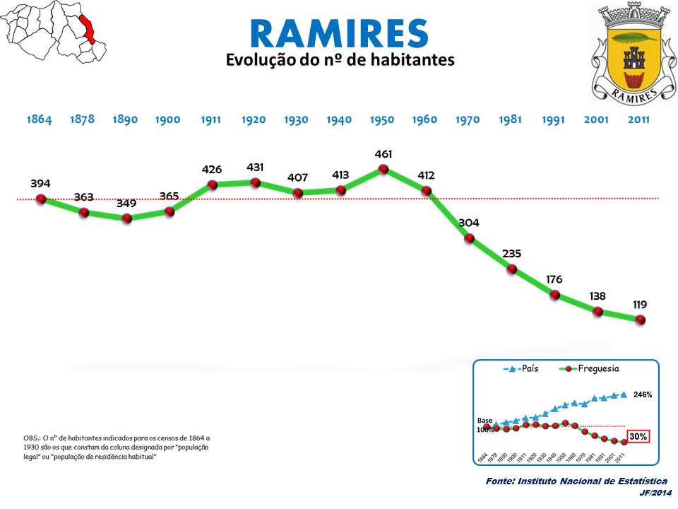 Evolução da População 1864 / 2011